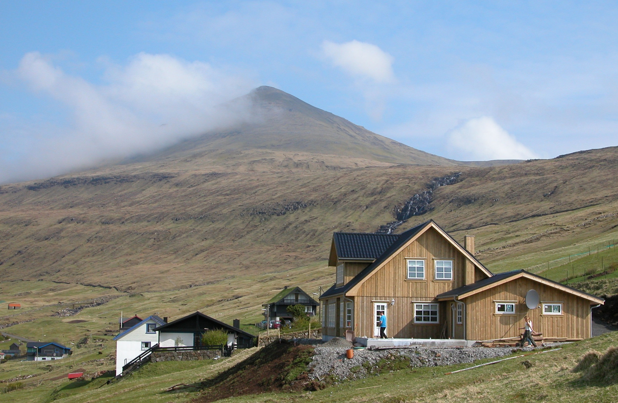 Sandavágur on Vágar, Faroe Islands.